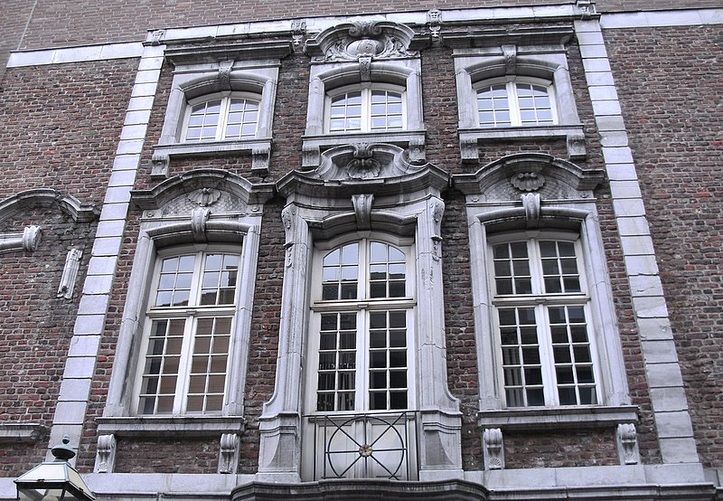 Fassade Wespienhaus Aachen